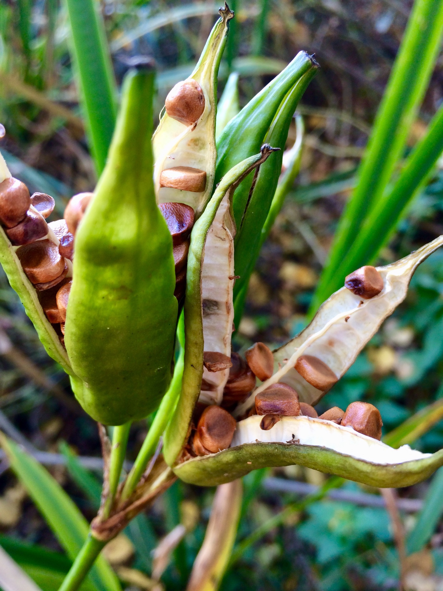 Tobolka se semeny kosatce žlutého (Iris pseudacorus)